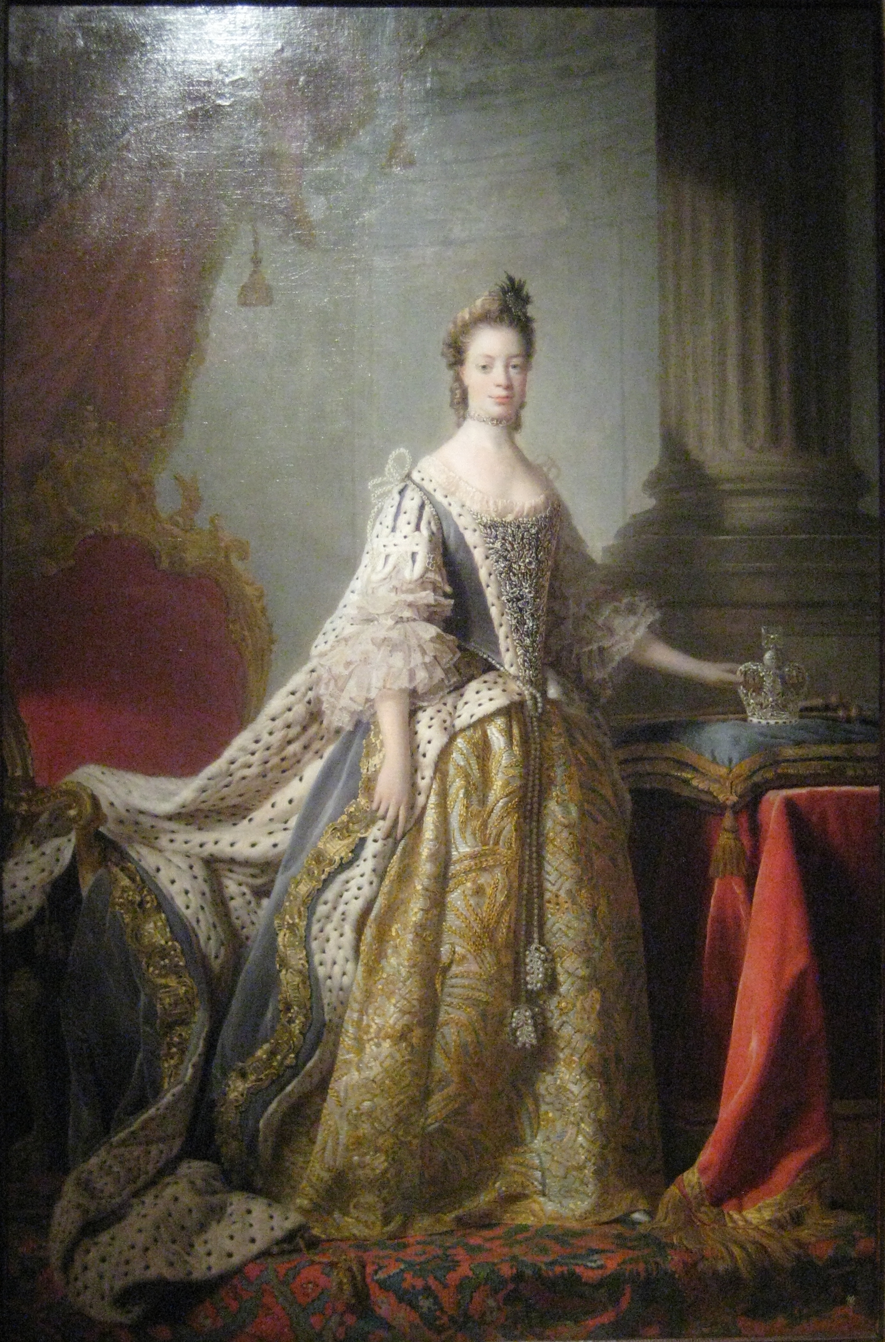 «Портрет Софии Шарлотты Мекленбург-Стрелицкой, жены английского короля Георга III» кисти английского художника Алана Рамзея (1713–1784). Это полотно, принадлежащее Рыльскому краеведческому музею (Курская область)